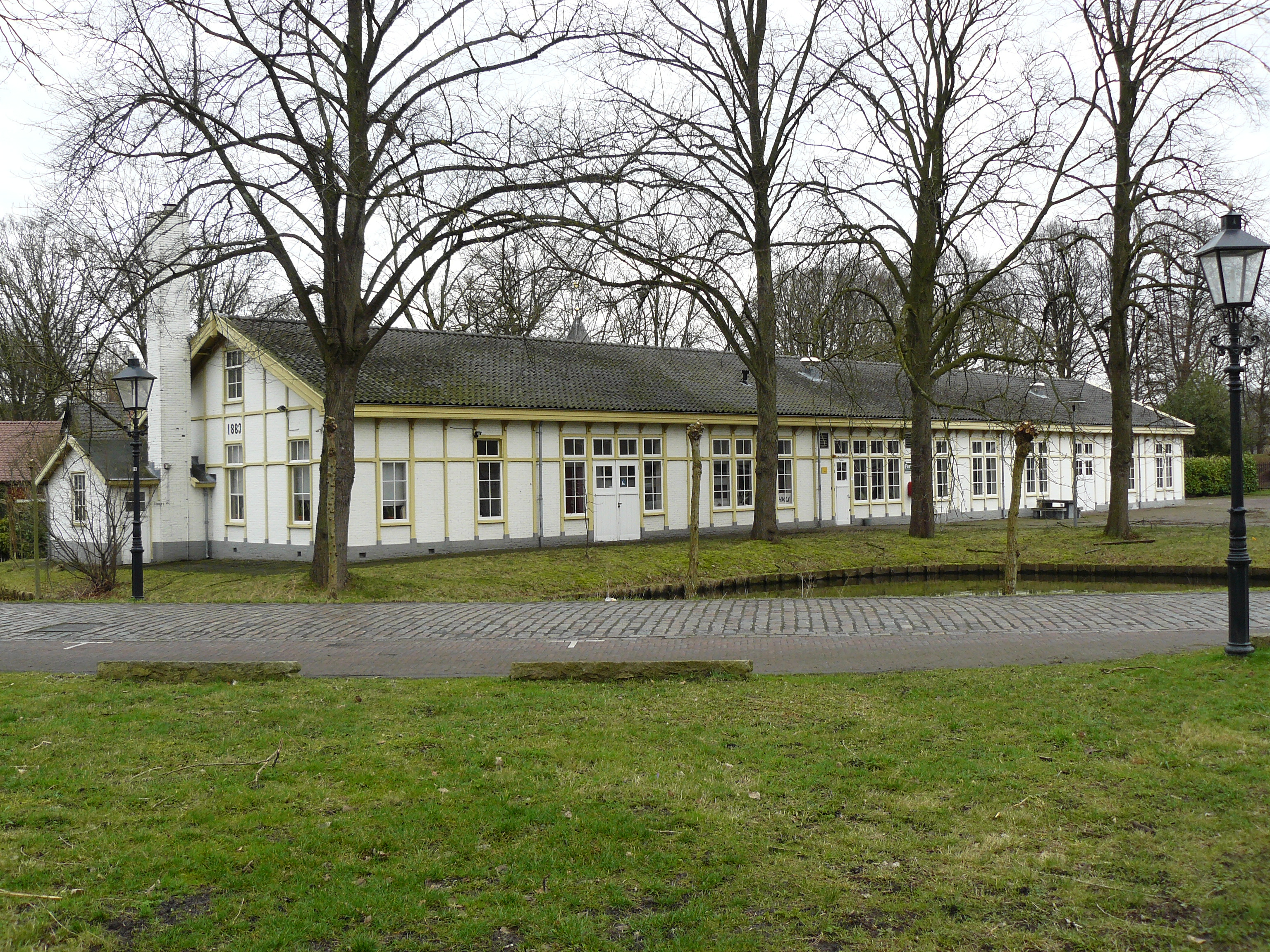 De loods / bakak (a1) staat haaks op de Kapelweg en ligt ten zuidwesten van de kerk. Het werd gebouwd in 1882-83. Het was een loods en later een (tijdelijk) onderkomen voor militairen.